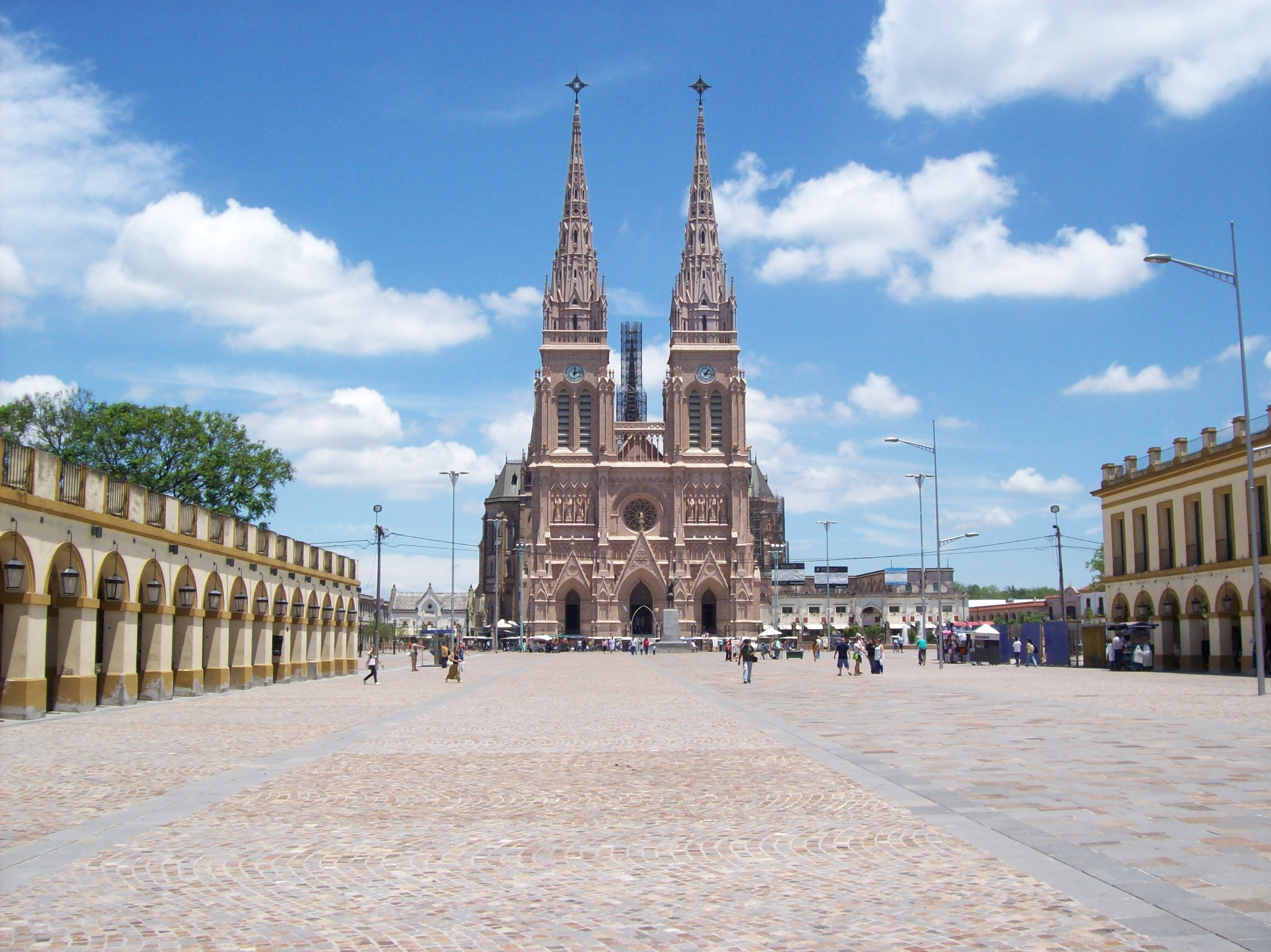 Basílica Nuestra Señora de Luján desde la Plaza Belgrano, en Luján, provincia de Buenos Aires, Argentina.